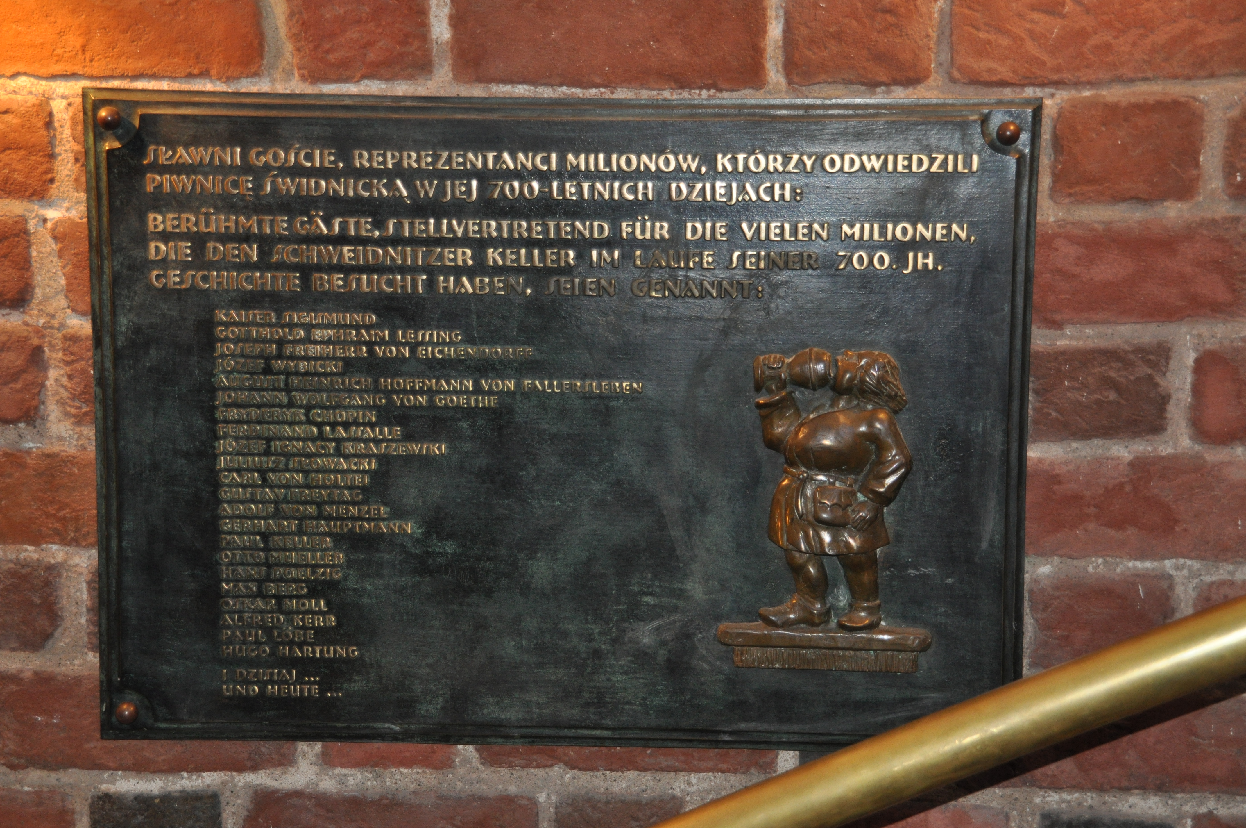 Tafel zur Erinnerung an berühmte Gäste im Eingang zum Schweidnitzer Keller in Breslau.